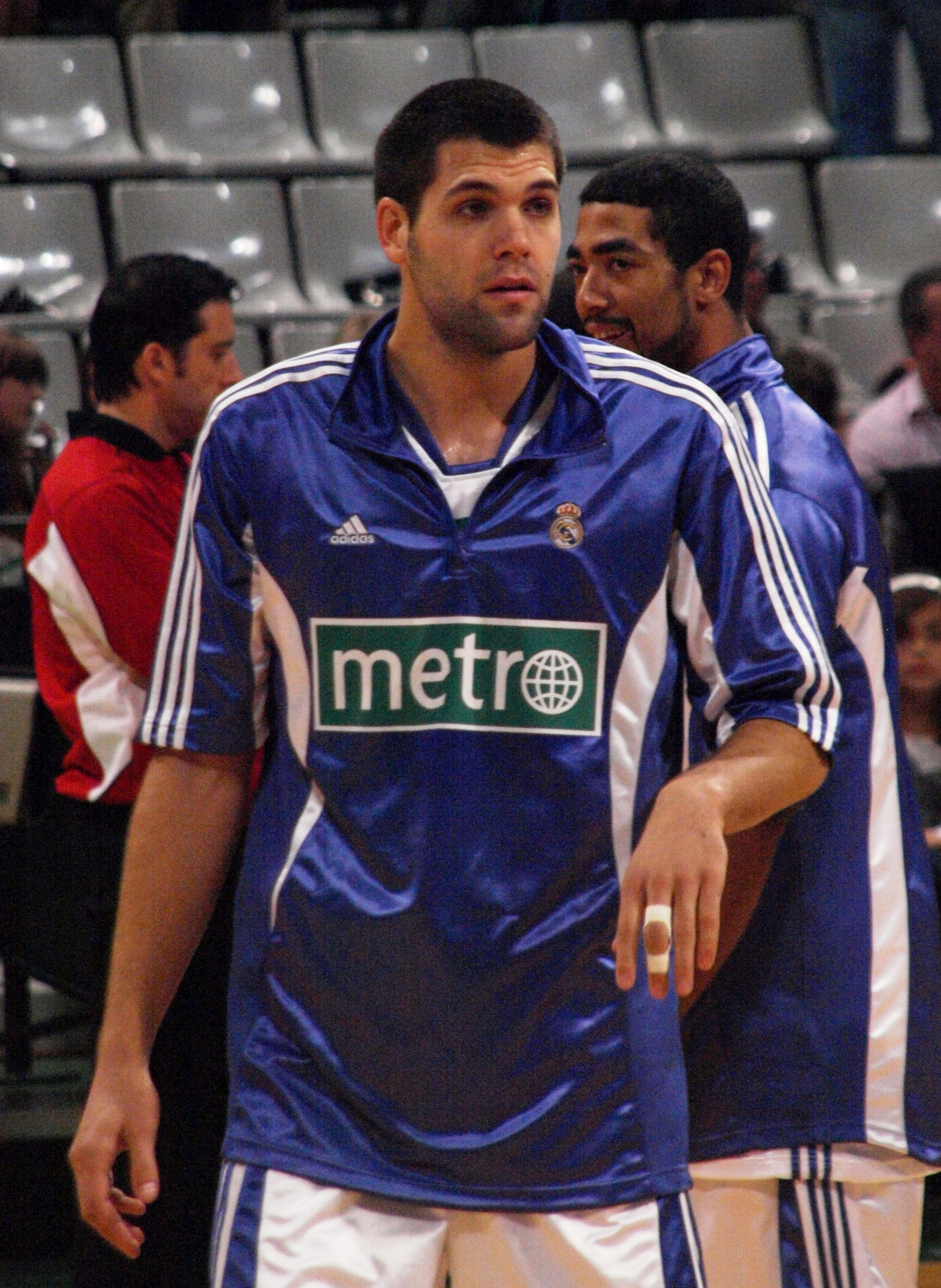 Felipe Reyes en la rueda de calentamiento previa al partido que enfrentó al Real Madrid y al DKV Joventut en el pabellón Olímpico de Badalona en noviembre de 2008